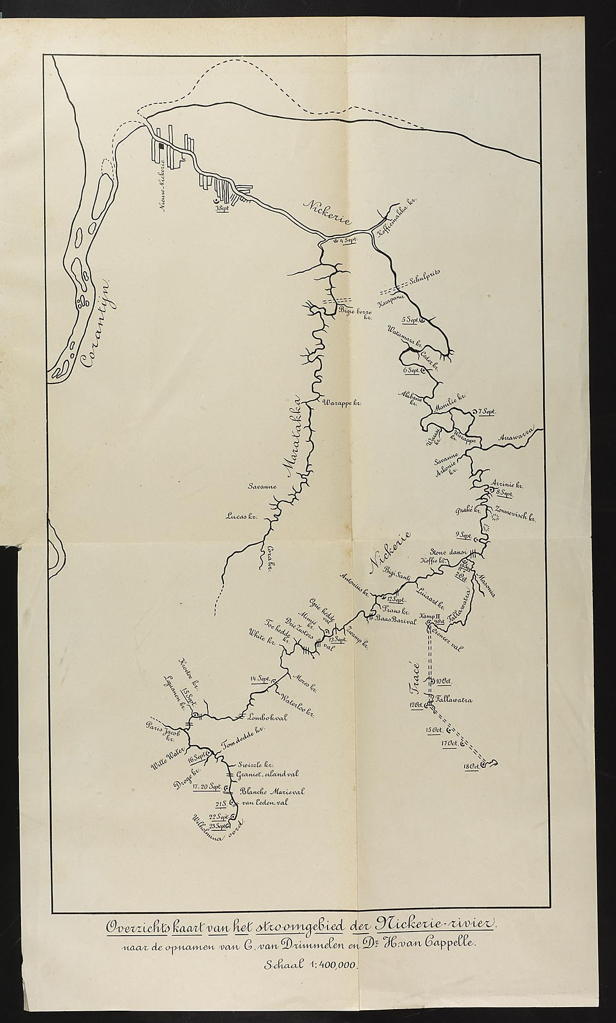 Kaart stroomgebied Nickerie (Suriname) getekend door C. van Drimmelen (1860-1935) en H. van Cappelle (1857-1932) tijdens n.a.v. expeditie in september/oktober 1900. Deze kaart stond in het boek "De binnenlanden van het district Nickerie, lotgevallen en algemeene uitkomsten van eene expeditie door het westelijk deel der kolonie Suriname in September en October van het jaar 1900." (1903)